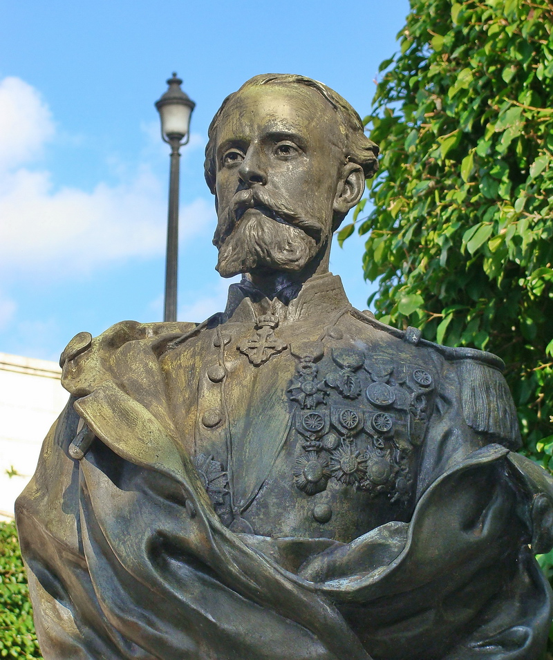 Busto de Lucien Napoléon Bonaparte-Wyse en la Plaza de Francia en ciudad de Panamá.